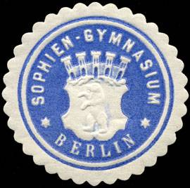 Sealing stamp Title: Sophien - Gymnasium - Berlin Description: blau, weiß, geprägt Place: Berlin size: 3 cm